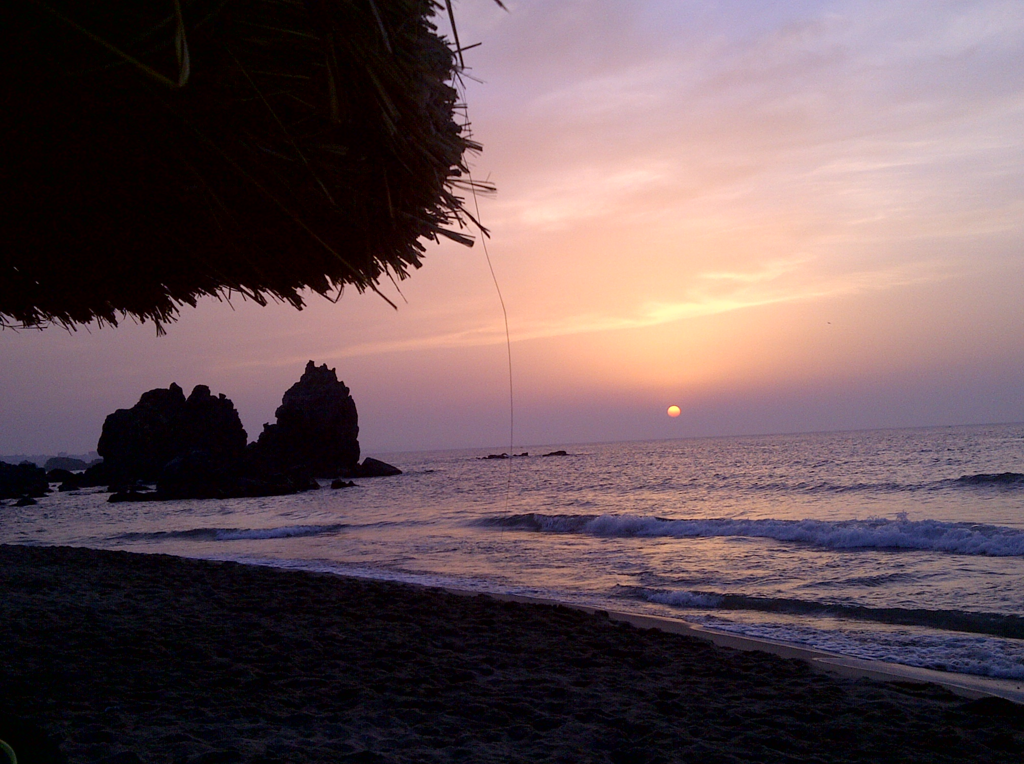 Photo prise à Figuier une plage a Boumerdes en Algérie